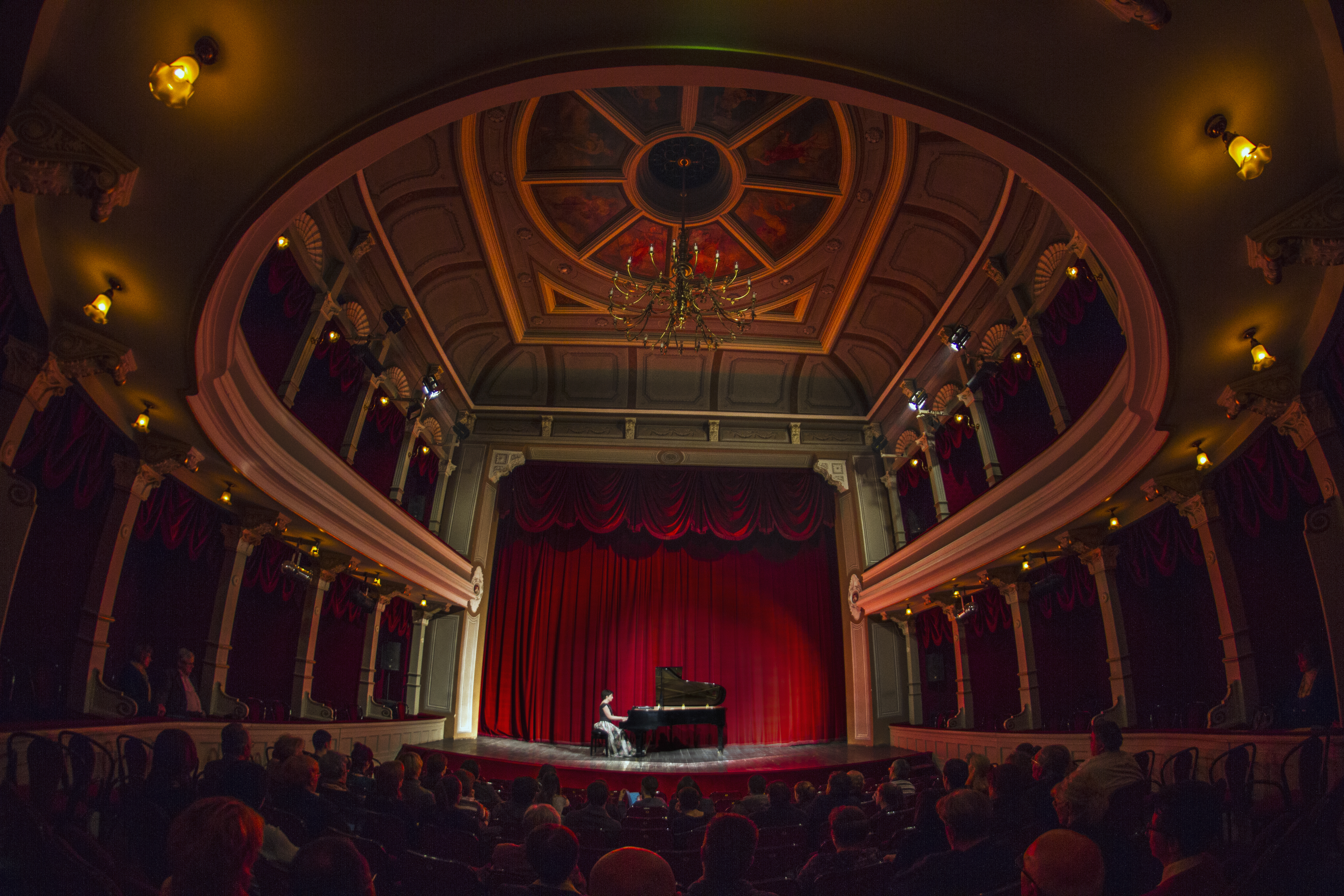 Narodno pozoriste Sombor koncert klavir